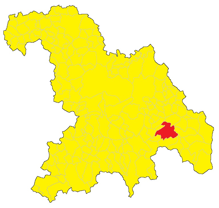 Mappa di Borghetto di Borbera (AL).